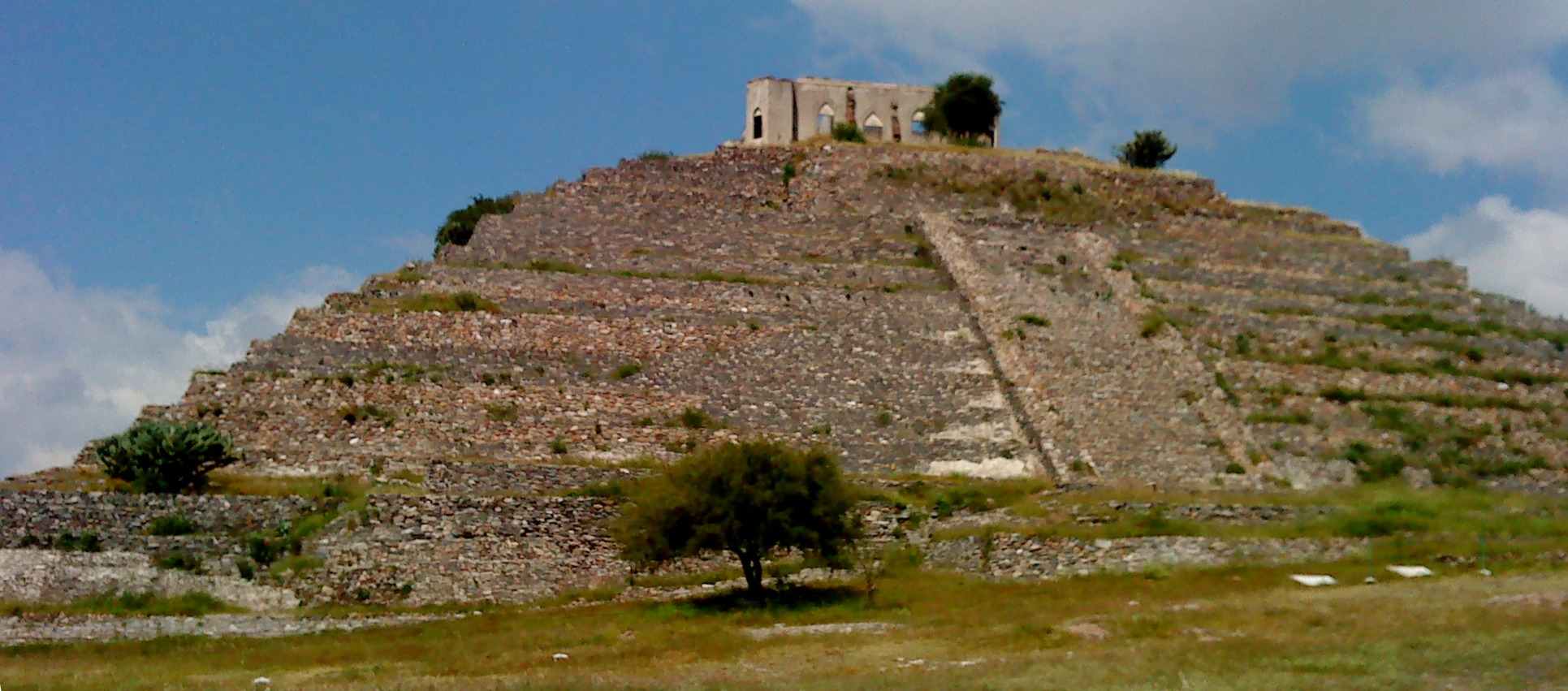 Fotografia de la Zona Arqueologica en Corregidora, Qro.